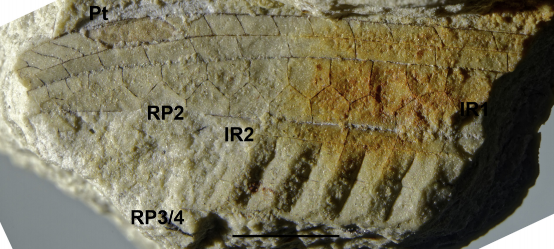 Фотография голотипа Steleopteron cretacicus. Шкала представляет 2 мм.